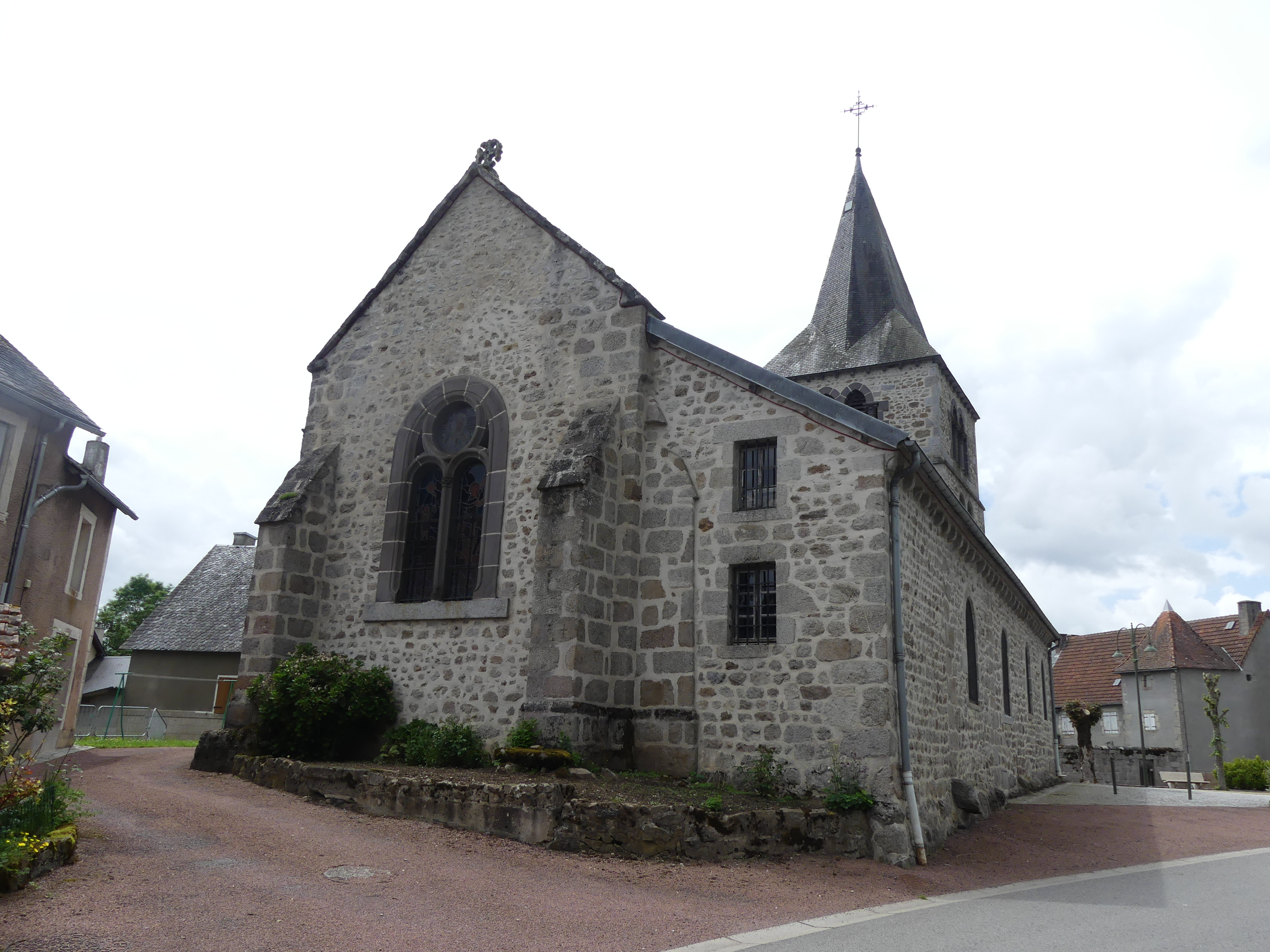 Le chevet de l'église de Saint-Merd-la-Breuille, Creuse, France.